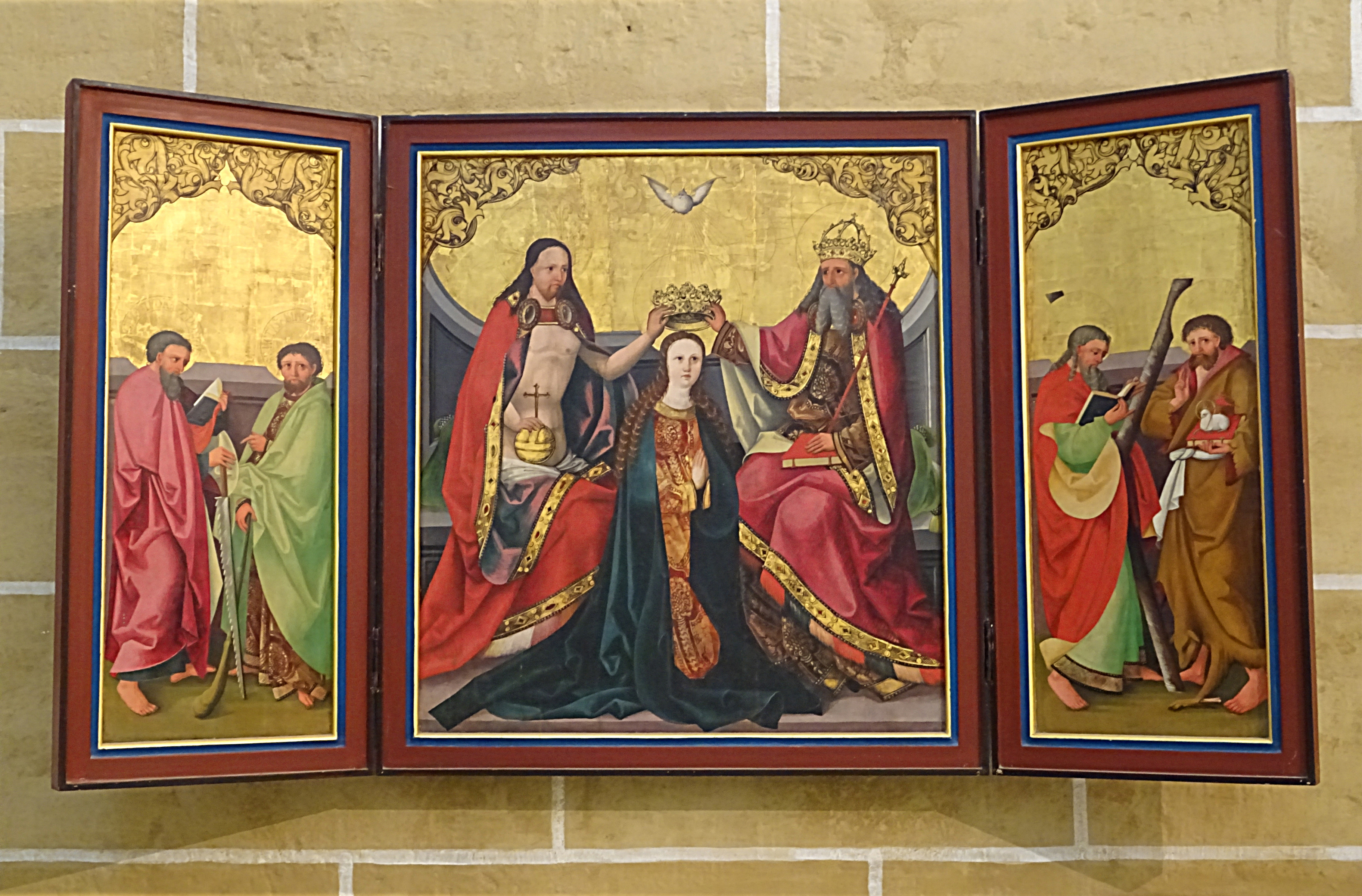 Marienkrönungsaltar um 1525 aus der 1570 geschlossenen Wallfahrtskirche Eichen (bei Mühlhausen, Wüstung seit 1582)